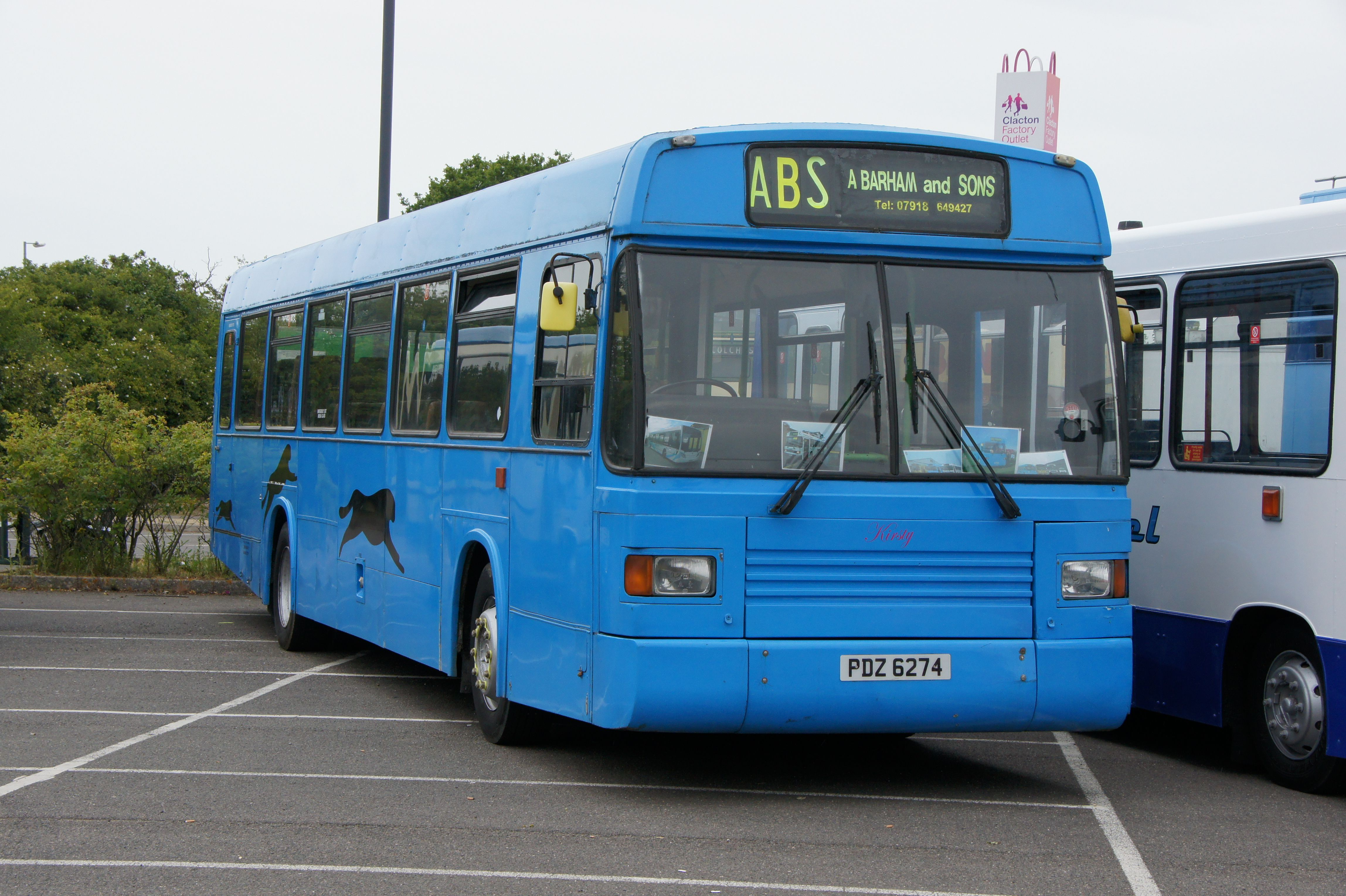 UHG744R-PDZ6274-4 050611 CPS